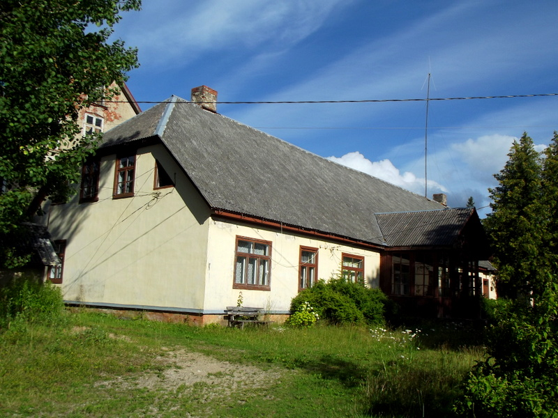 Almāles muiža